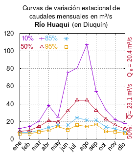 Curvas de variación estacional del río Huaqui en Diuquín. # Dirección General de Aguas # Ministerio de Obras Públicas (Chile) # Evaluación de los recursos hídricos superficiales de la cuenca del río Bio Bio. # Santiago de Chile # oct 2004 # url # Ver anexo 4, página 25. # Página 25 del navegador pdf mes 10% 50% 85% 95% ene 12.35 9.00 7.55 5.99 feb 14.53 9.74 7.65 6.03 mar 20.48 14.18 10.17 8.22 abr 38.34 21.12 13.04 9.82 may 24.76 19.61 16.24 14.53 jun 75.47 31.83 15.84 10.51 jul 80.79 44.00 24.17 16.06 ago 107.28 44.33 21.69 14.26 sep 54.08 32.39 21.39 16.77 oct 33.30 22.57 13.90 8.80 nov 22.35 16.30 11.42 8.54 dic 17.90 11.71 8.31 6.79